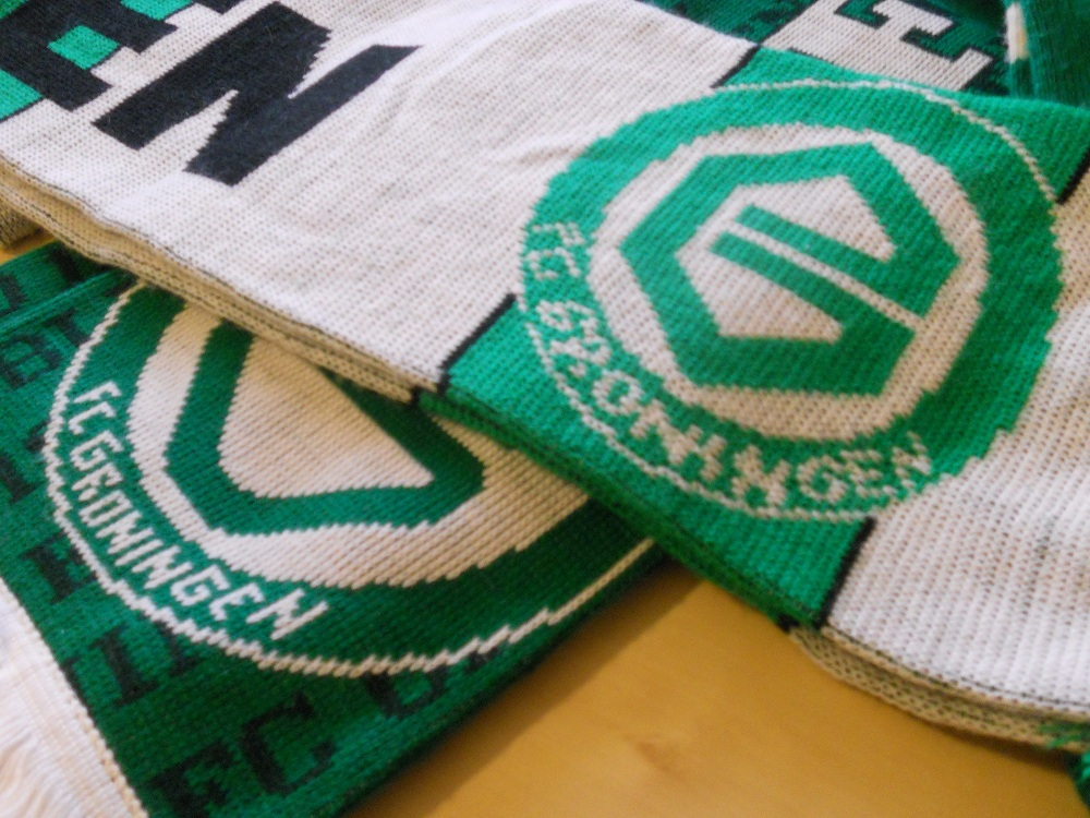 FC Groningen sjalen met logo